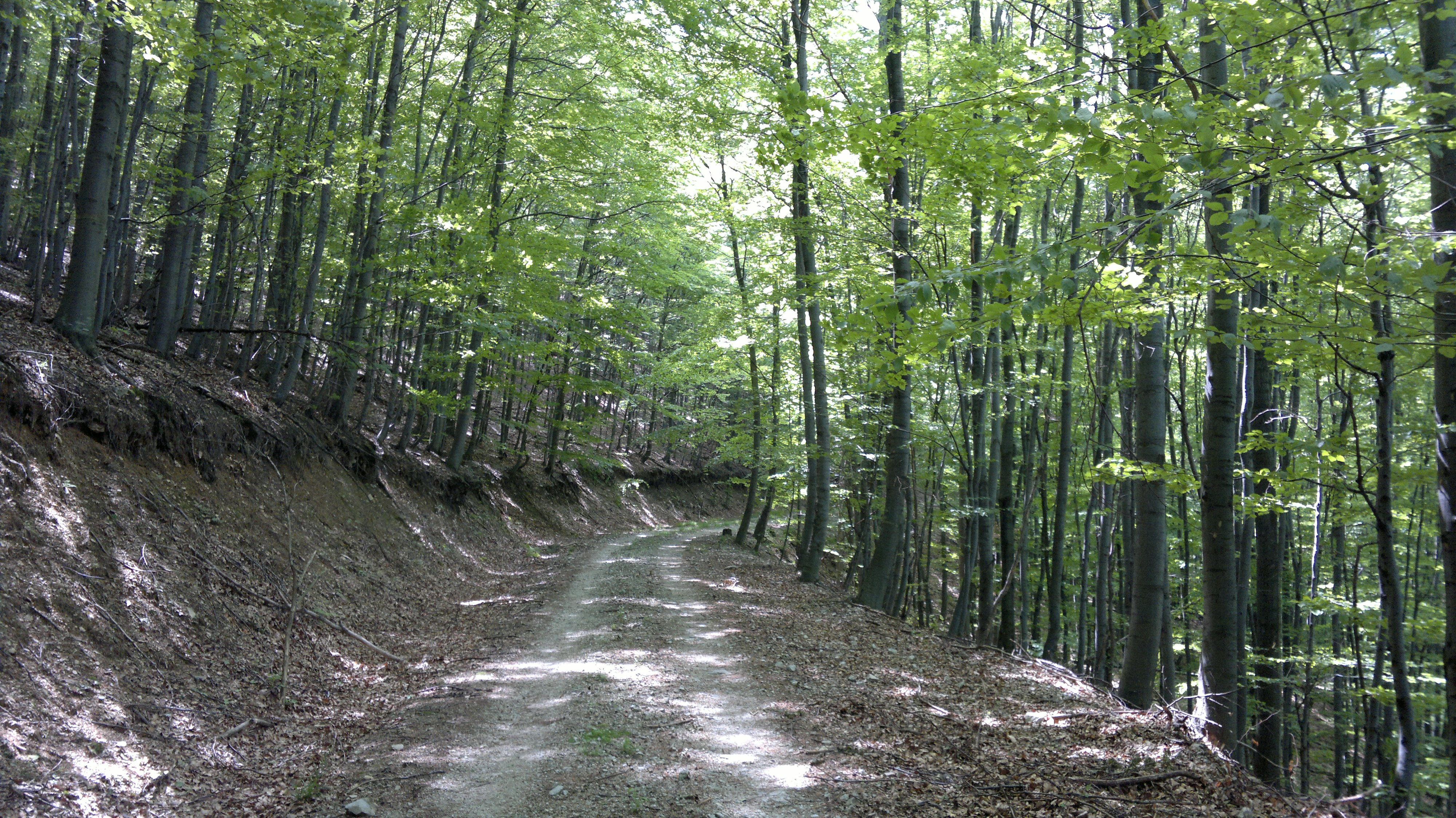 Duzluk, Croatia